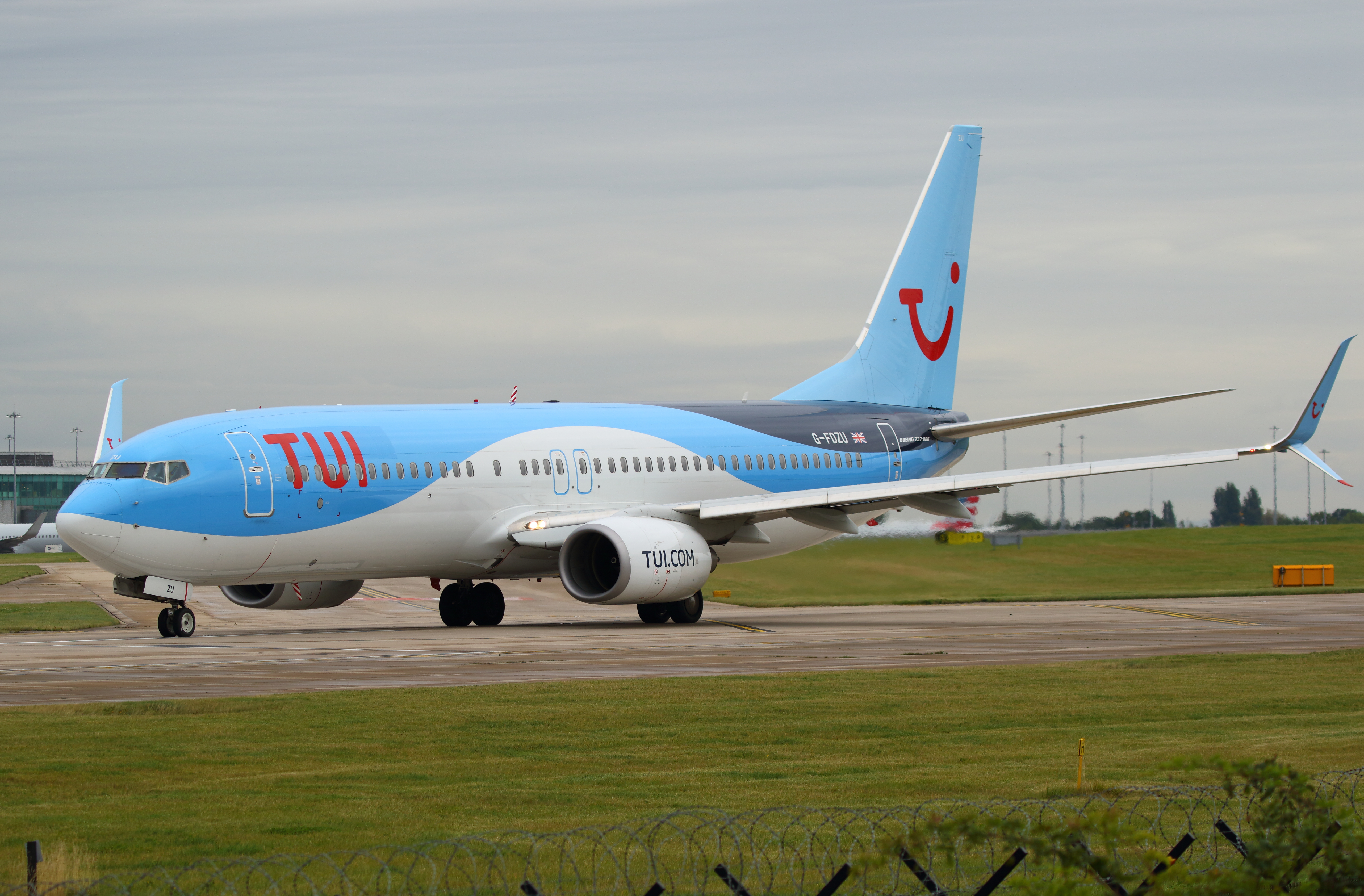 TUI B737